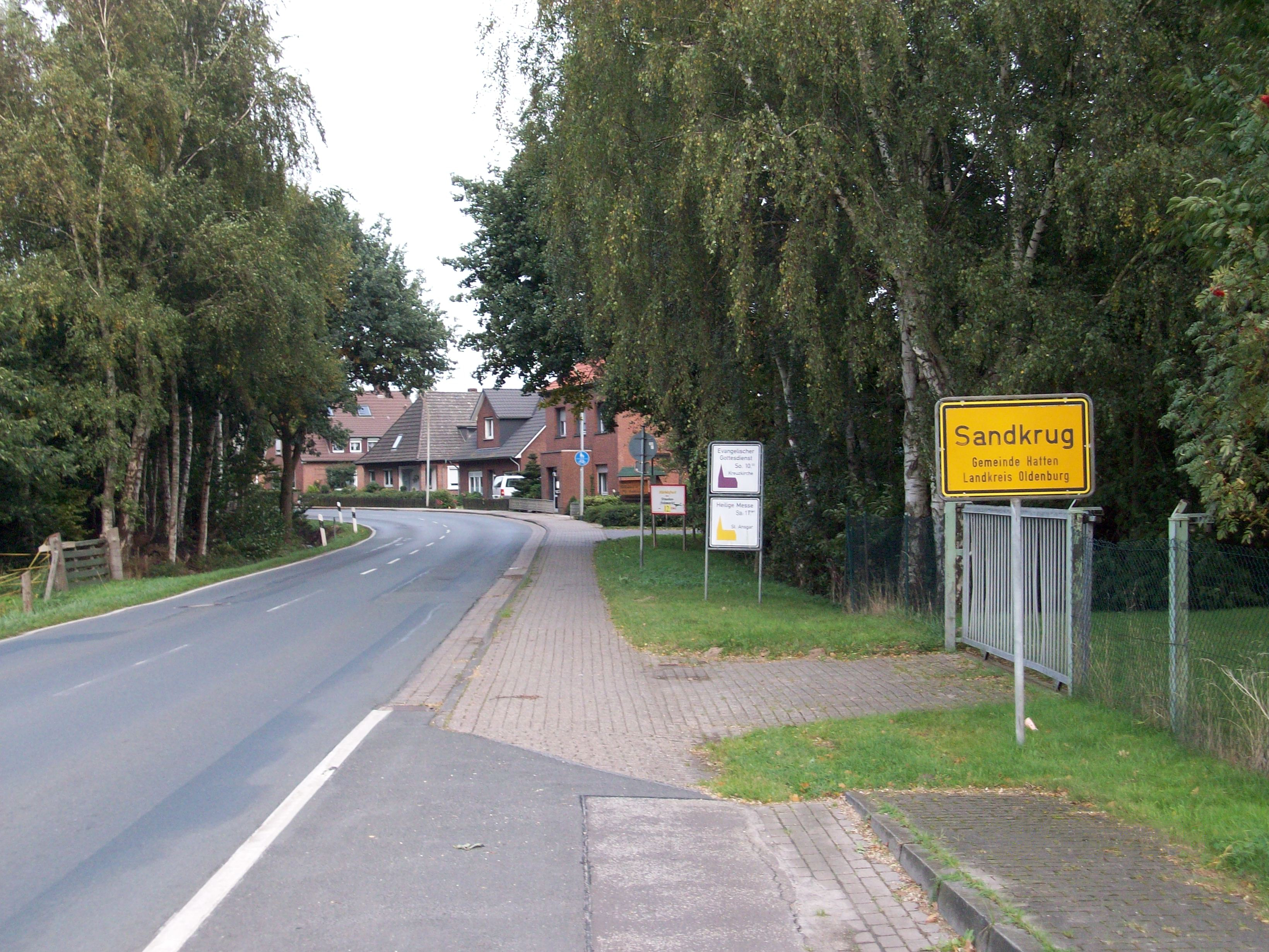 Ortseingang von Sandkrug